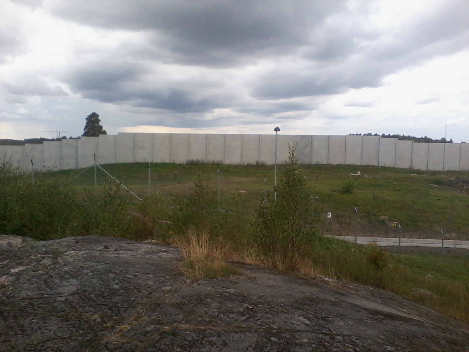 Norrtäljeanstalten från baksidan